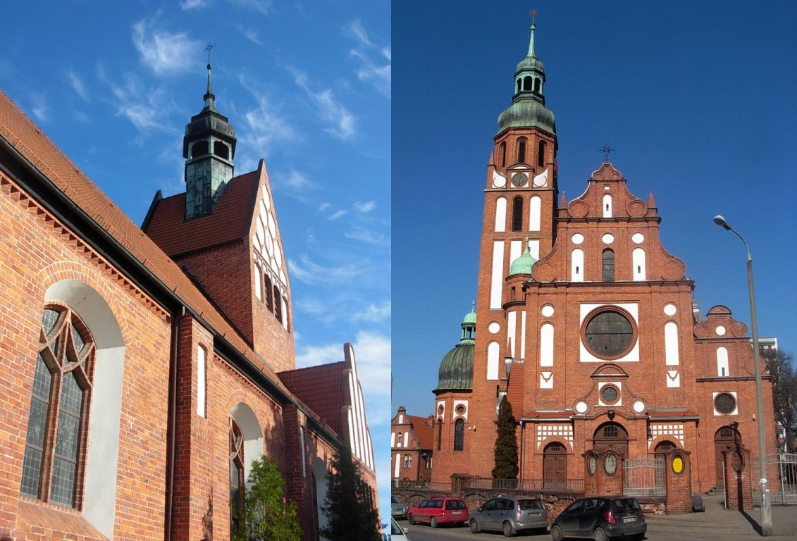 Kościoły Bydgoszczy: św. Józefa i Św. Trójcy